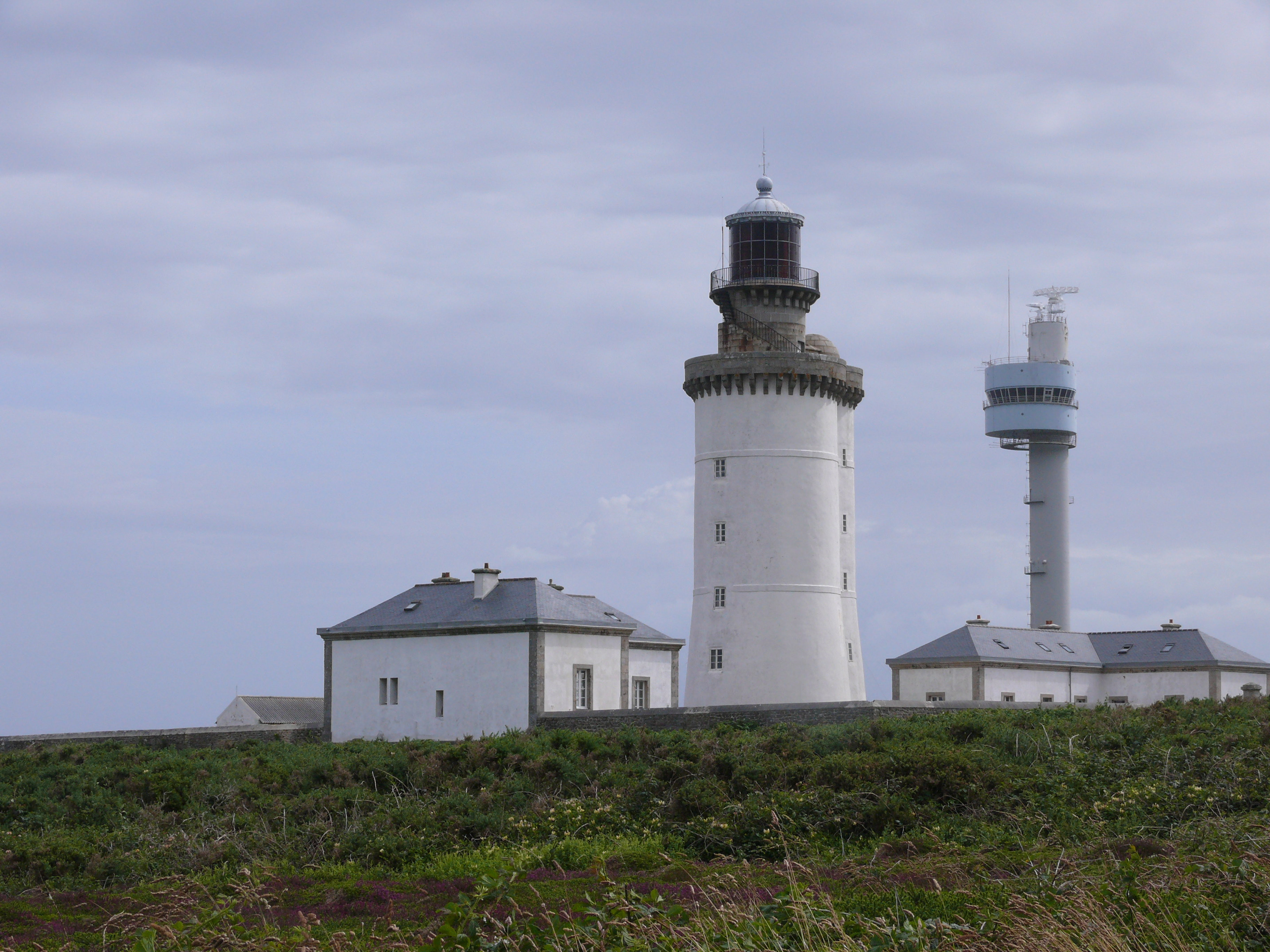 Le Phare du Stiff